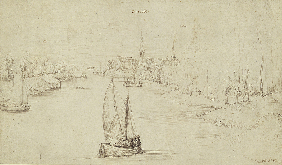 Federzeichnung in Braun (o. J.) von Pieter Bruegel (der Ältere) [09.09.1569]Blattmaá 25,0 x 42,1 cmInventar-Nr.: KdZ 5763Person: Pieter Bruegel d. Ä. [1526/30 - 1569], Flämischer Maler Systematik:Personen / Künstler / Bruegel, Pieter d. Ä. / Werke